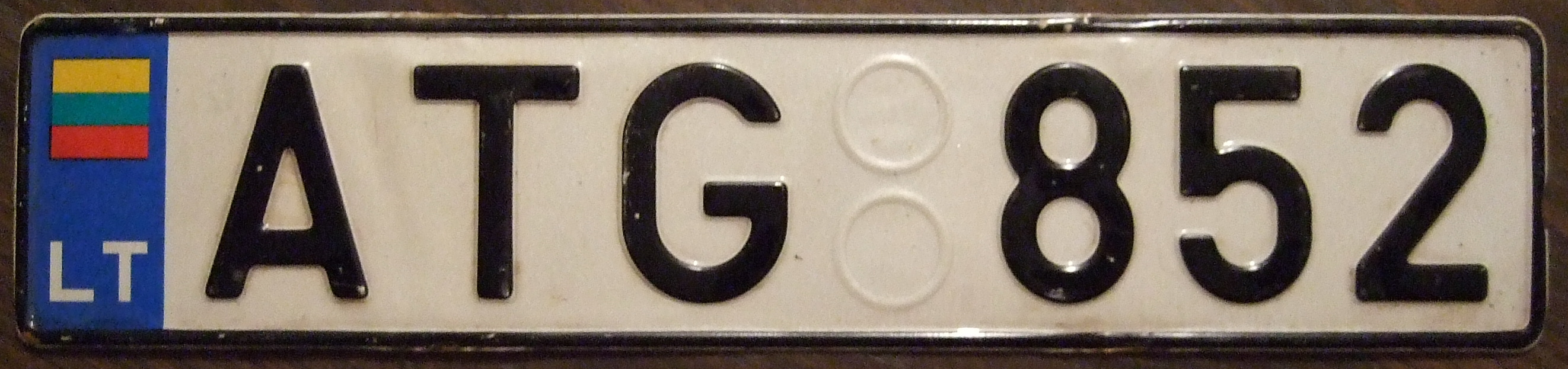 LITHUANIA 1990'S passnger